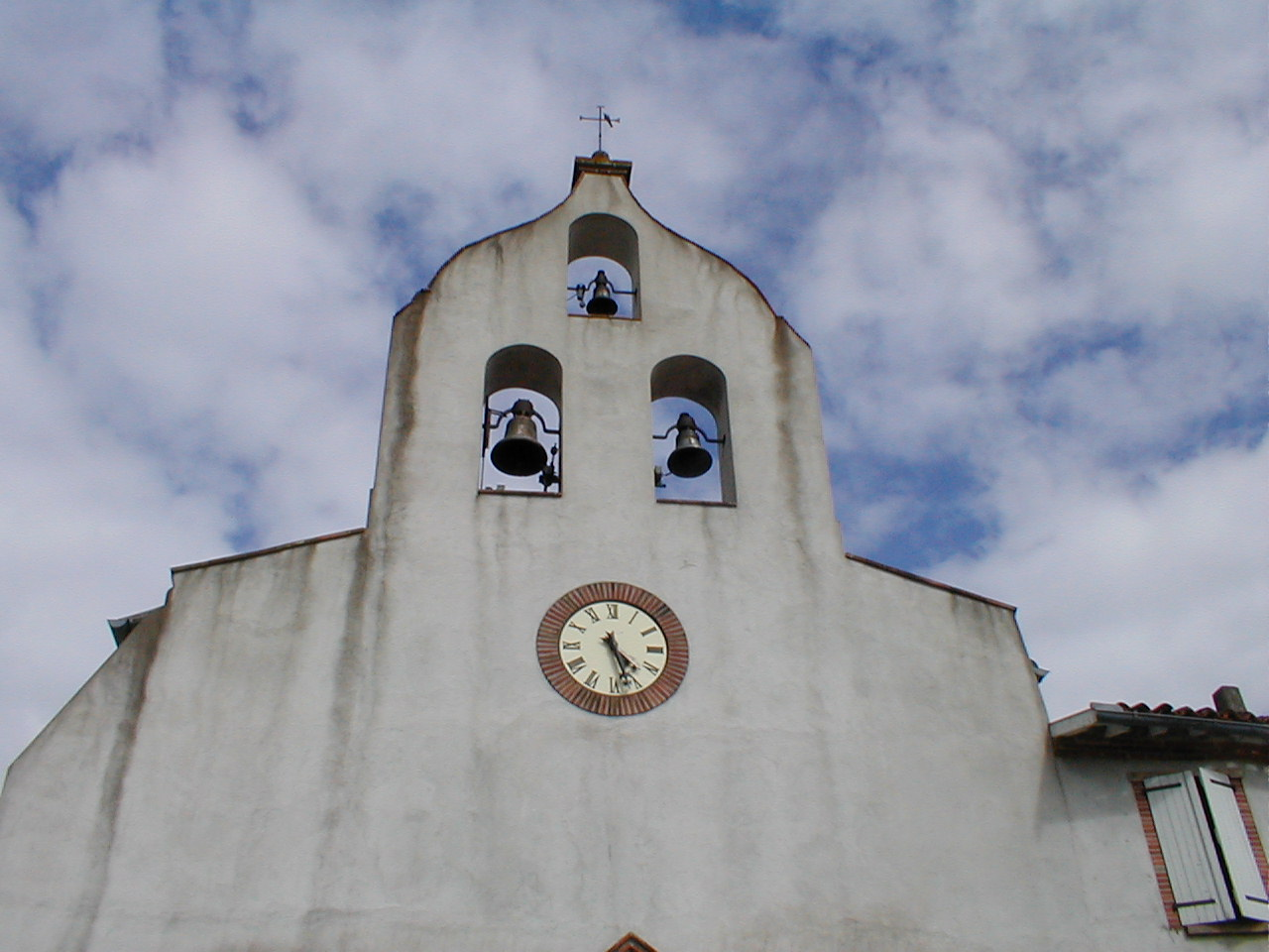 L'Eglise du village de Lacourt St Pierre. Il existait une deuxième église semblable (St JEAN) qui fut détruite.